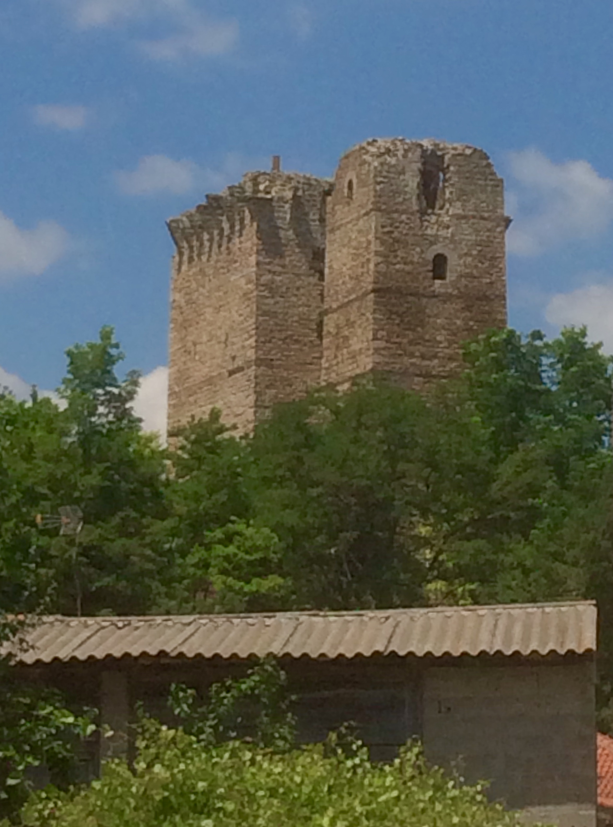 Die Burgruine in Pythion